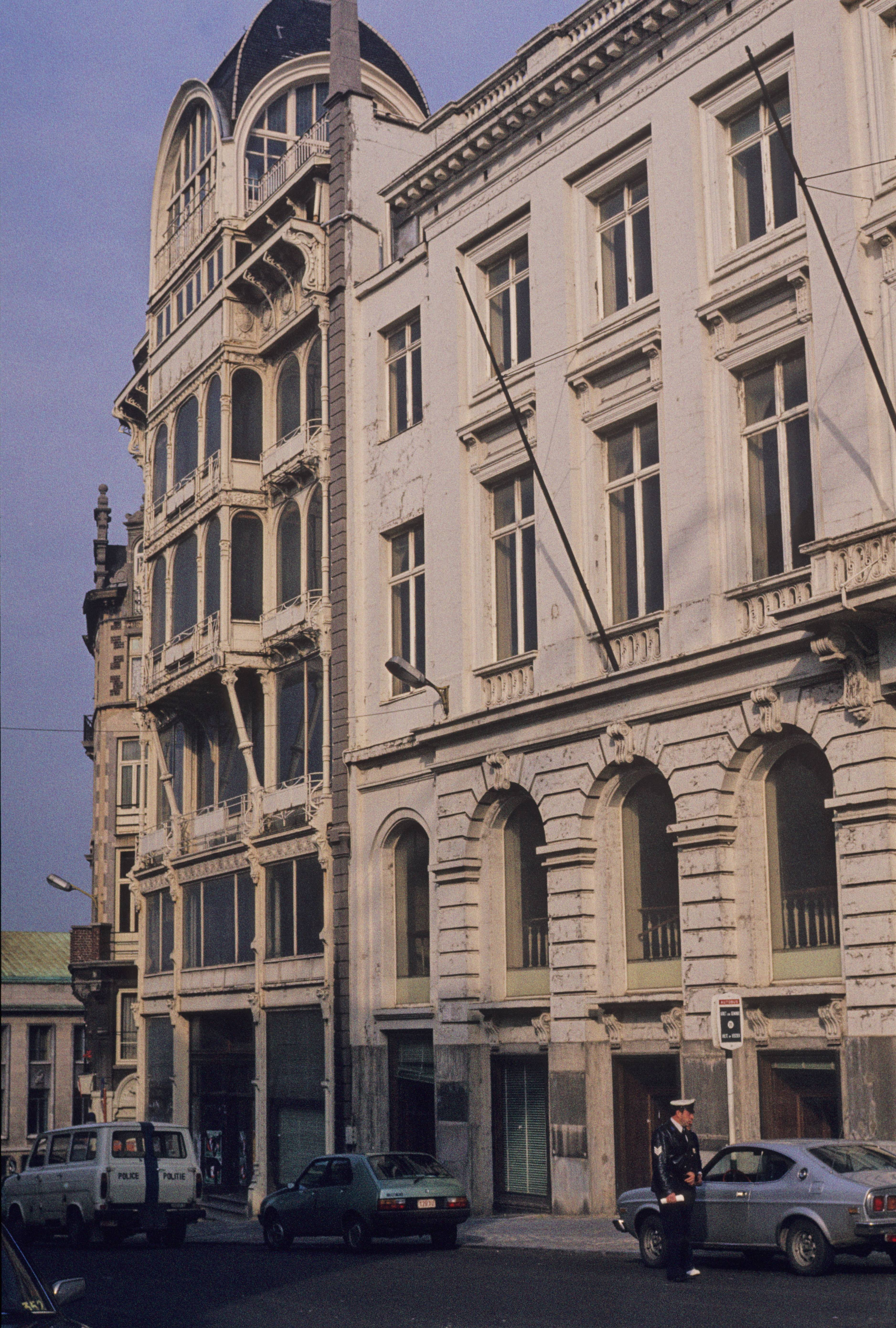 Magasin Old England, rue de la Montagne de la Cour, Bruxelles